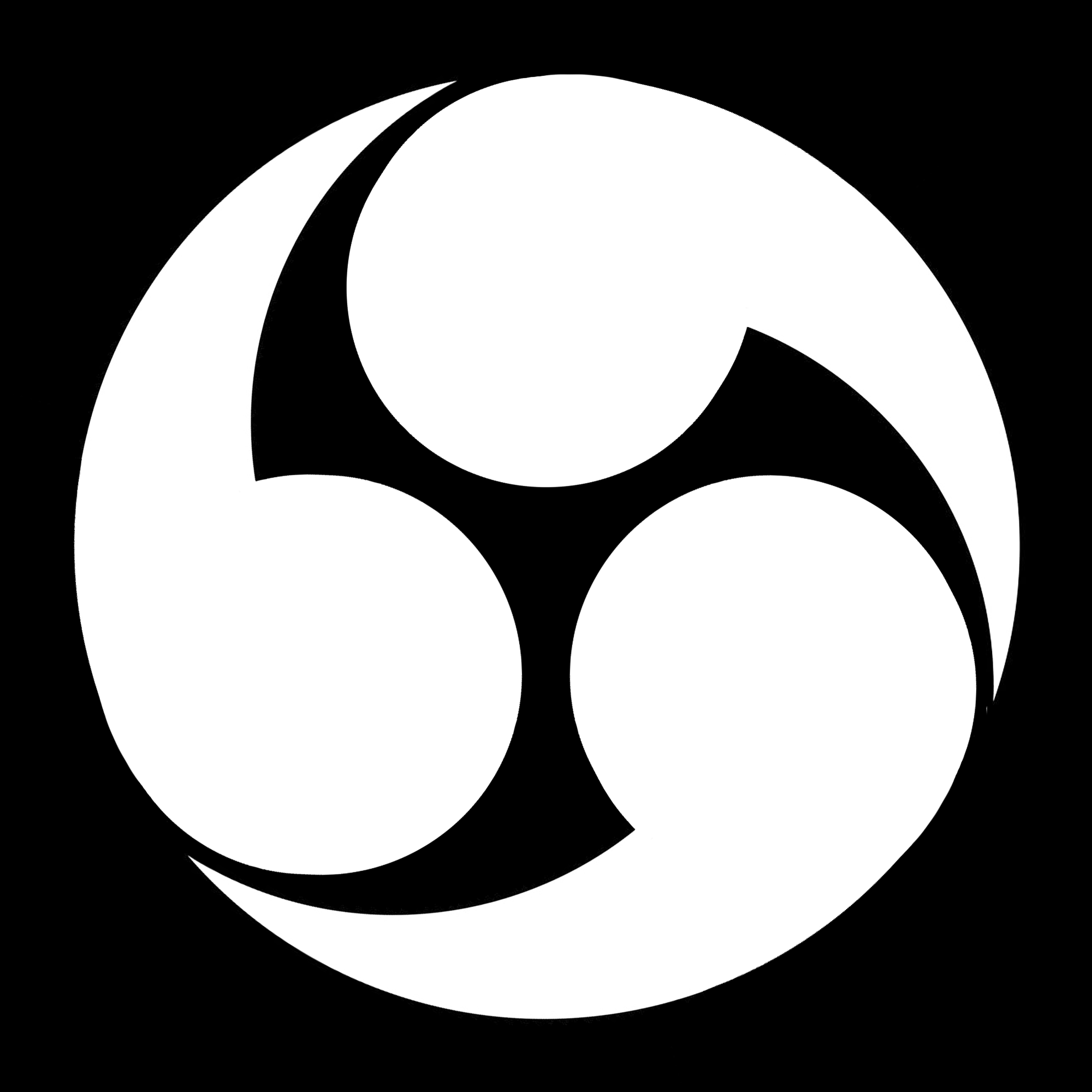 「右三つ巴」紋（染抜）